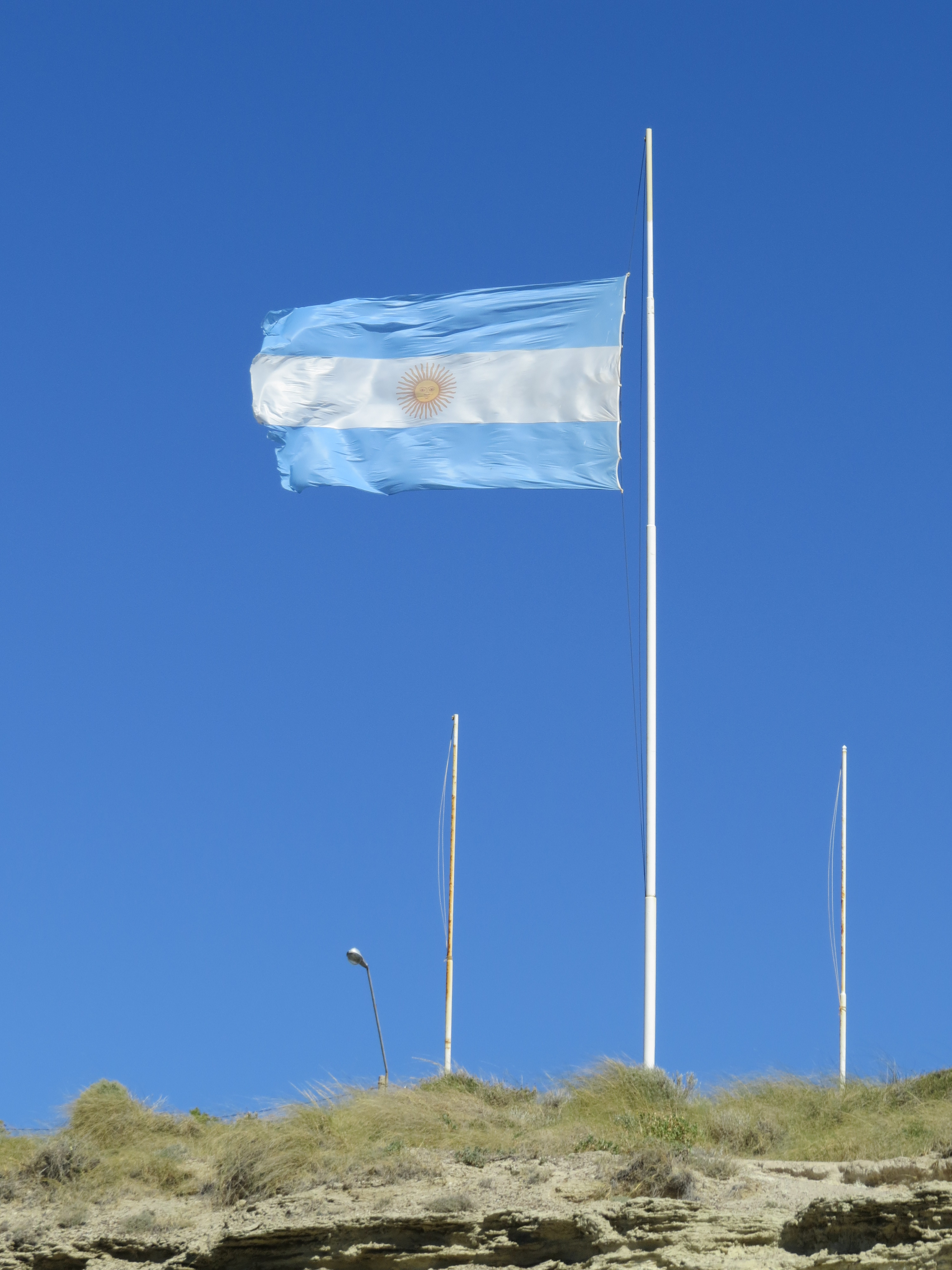 Bandera de Argentina